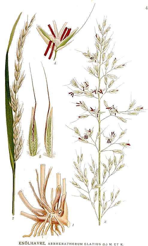 Arrhenatherum elatius (L.) P.Beauv. ex J.Presl & C.Presl., syn. Arrhenatherum elatius (L.) Mert. & W.D.J. Koch Original Description "Knölhavre", Arrhenatherum elatius (L.) M. et K.